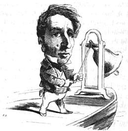 Caricature de Théobald de Lacrosse (1796-1865) par Cham.